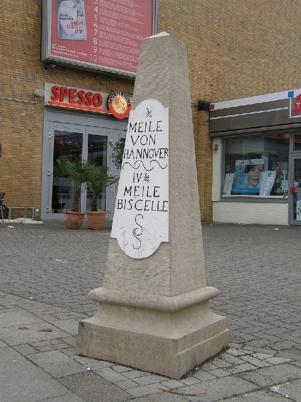 Der Gehaplatz in Hannover